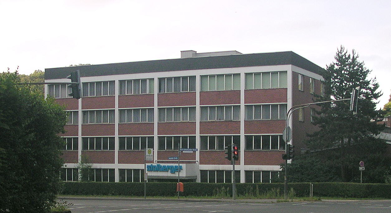 Stolberg, Firma "Stolberger"